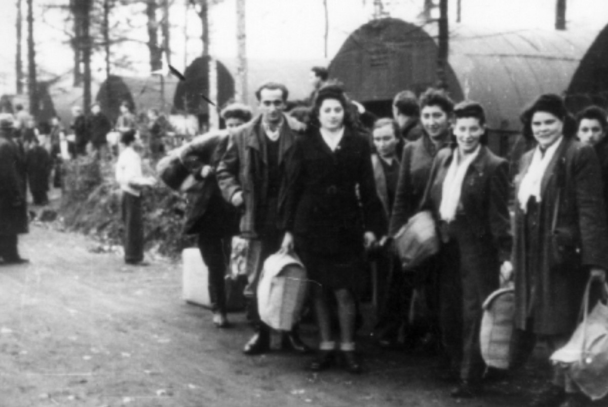 פלי"ם ספינות המעפילים ג - אקסודוס - ספינות המעפילים – אקסודוס יציאת אירופה תשז - מובלים, מוסעים, נרדפים ומגורשים - בכניסה למחנה מעצר אמסטאו בגרמניה